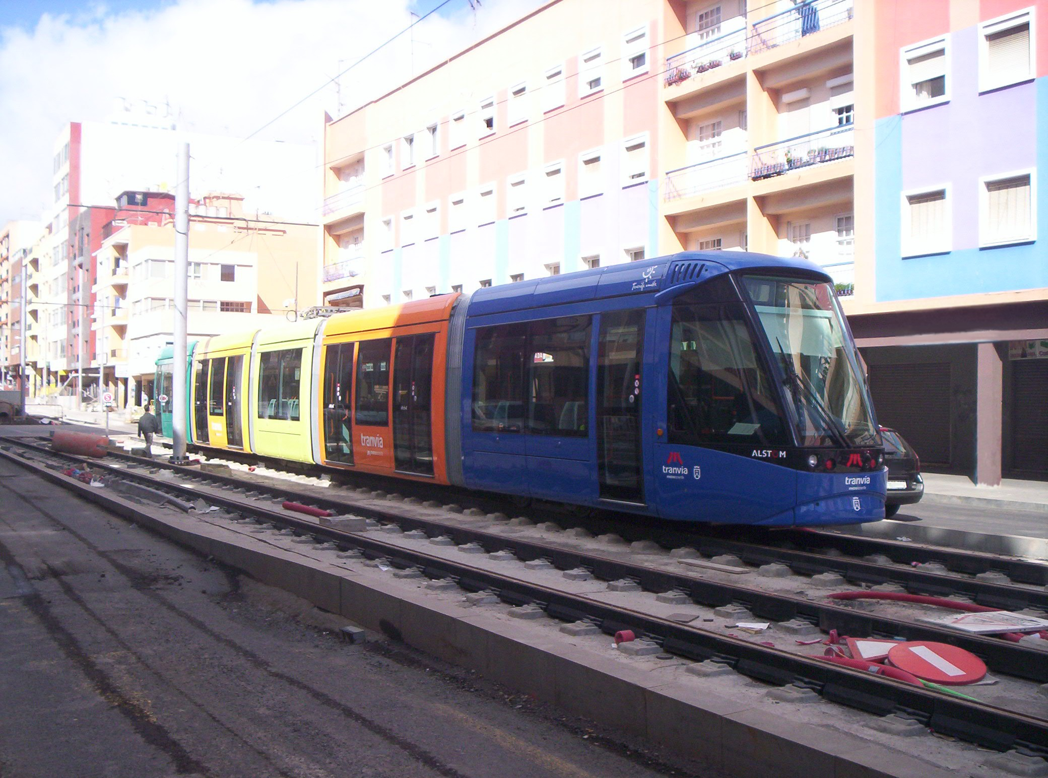 Foto, en primer plano, del Tranvía de Tenerife en su recorrido de prueba por San Cristóbal de La Laguna.